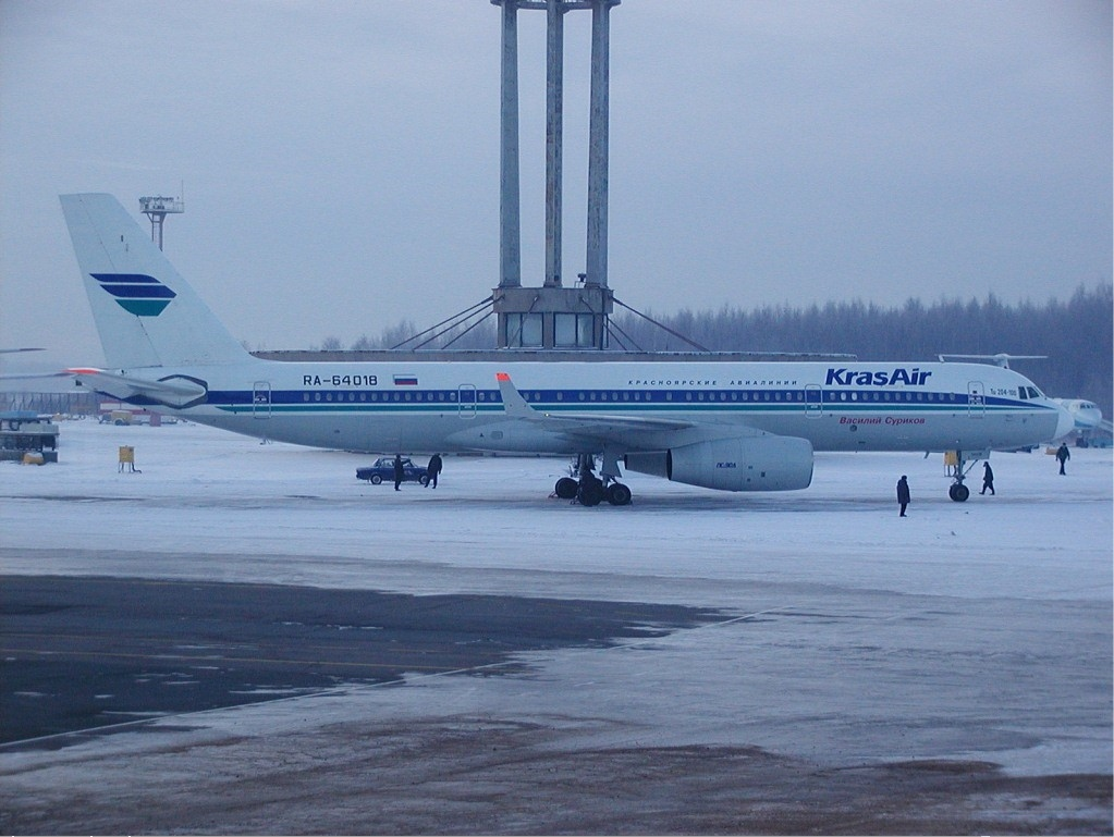 KrasAir Tupolev Tu-204